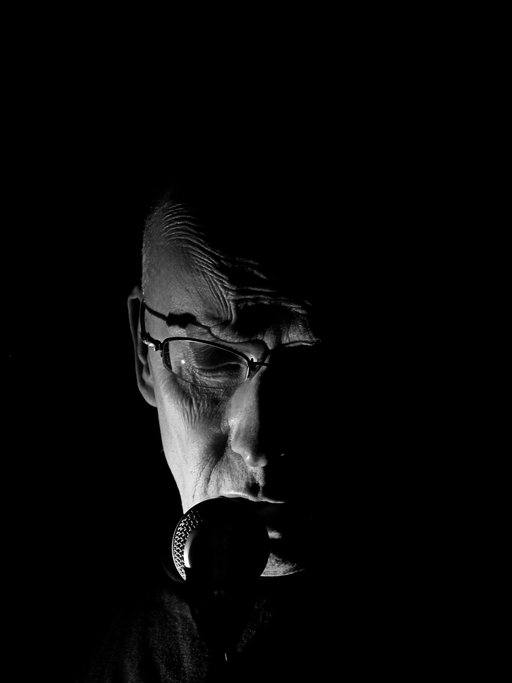 Leif Elggren